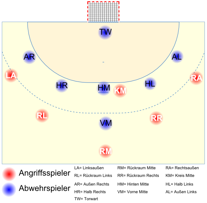 Darstellung einer 5:1-Deckung im Handball. Positionsbezeichnungen nach Handball Handbauch ISBN 3-89417-063-8, abgeleitet von 5-1-Deckung.png